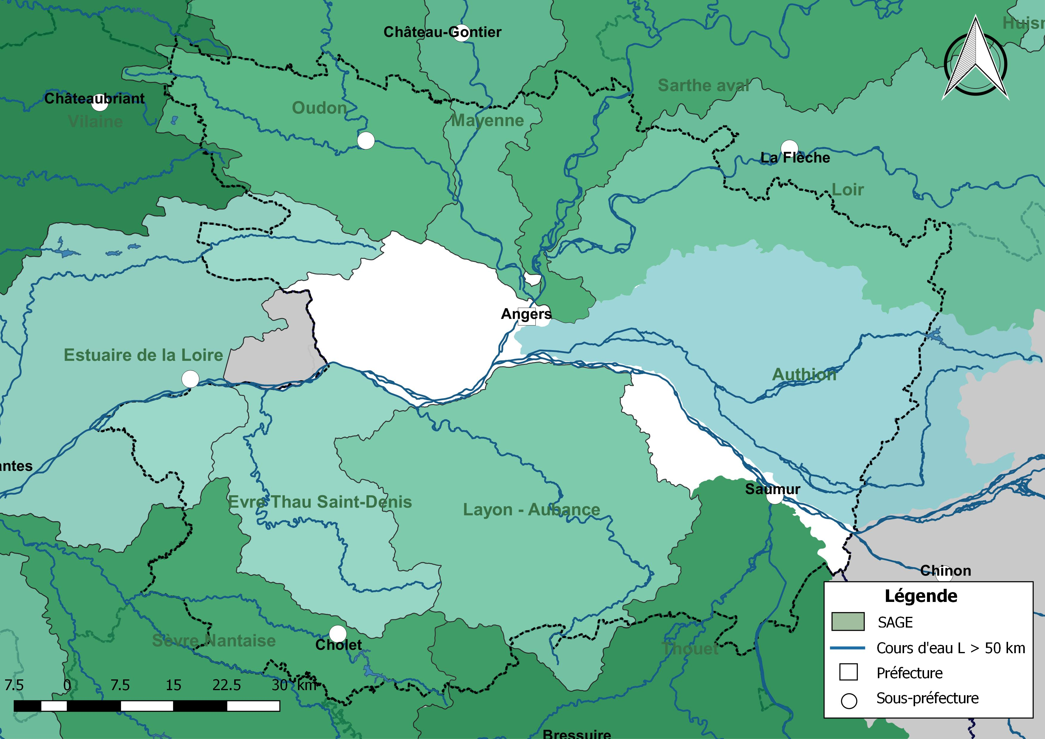 Carte des schémas d'aménagement et de gestion des eaux (SAGE) concernant le département de Maine-et-Loire (France) au 1er janvier 2018.